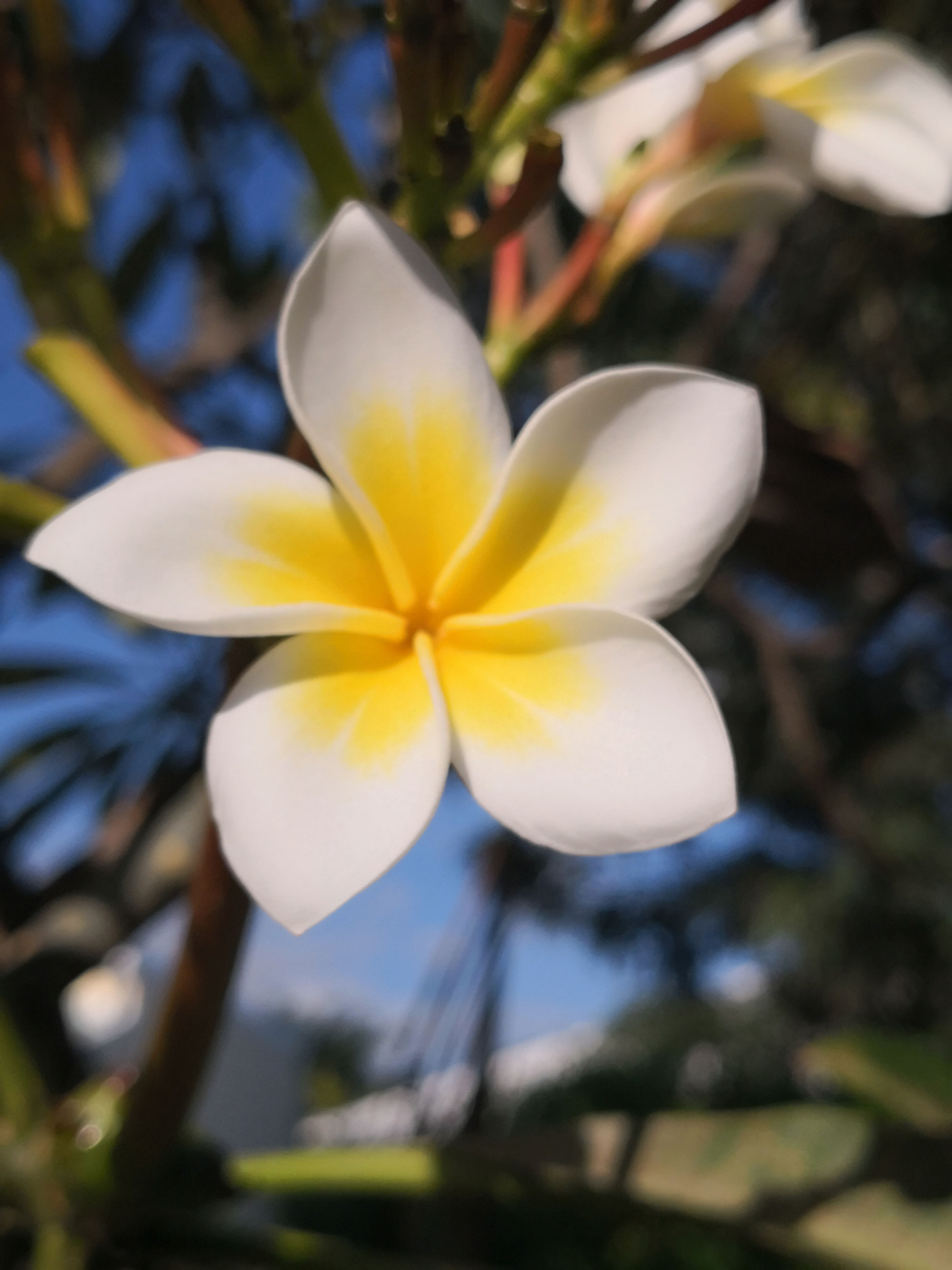 Les fleurs de frangipanier sert à decorer les cimetières à la Réunion